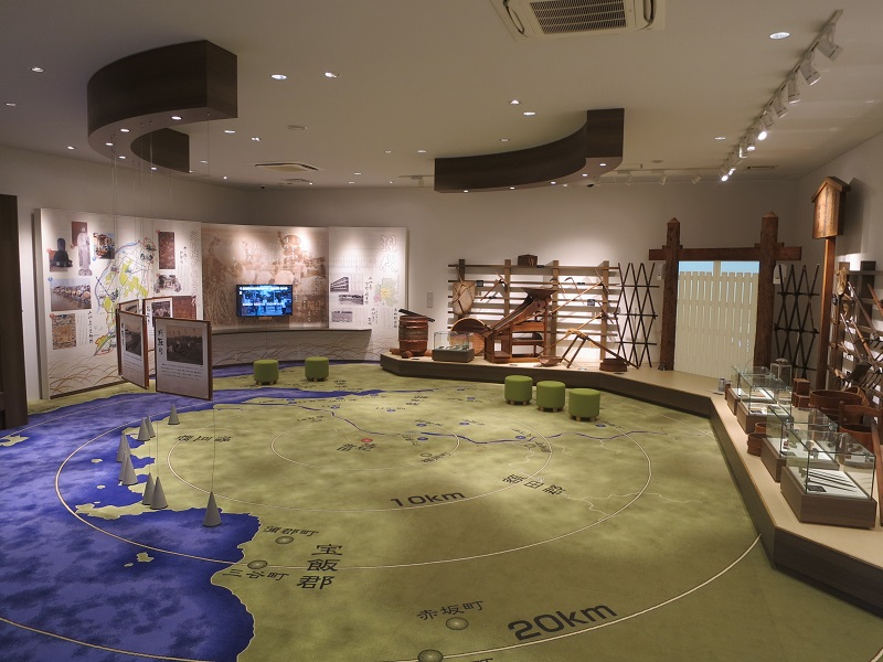 悠紀の里・民俗資料館